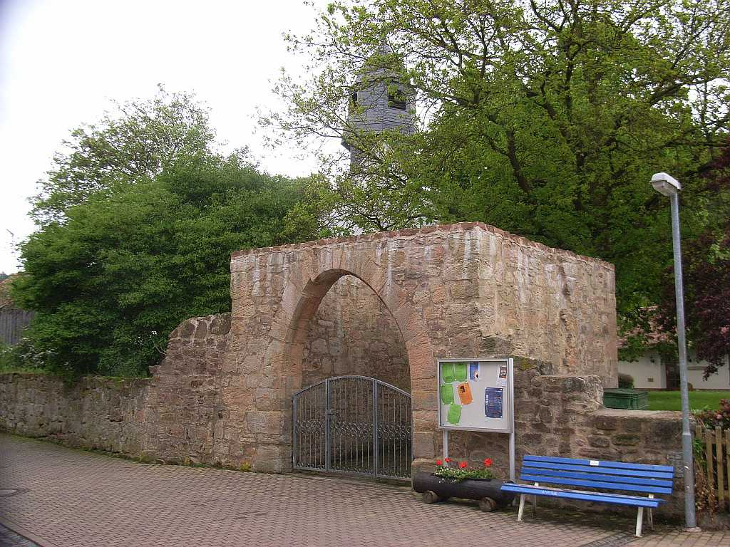 Kirche und Mauerreste im Dorfkern Wetter-Unterrosphe, Hessen